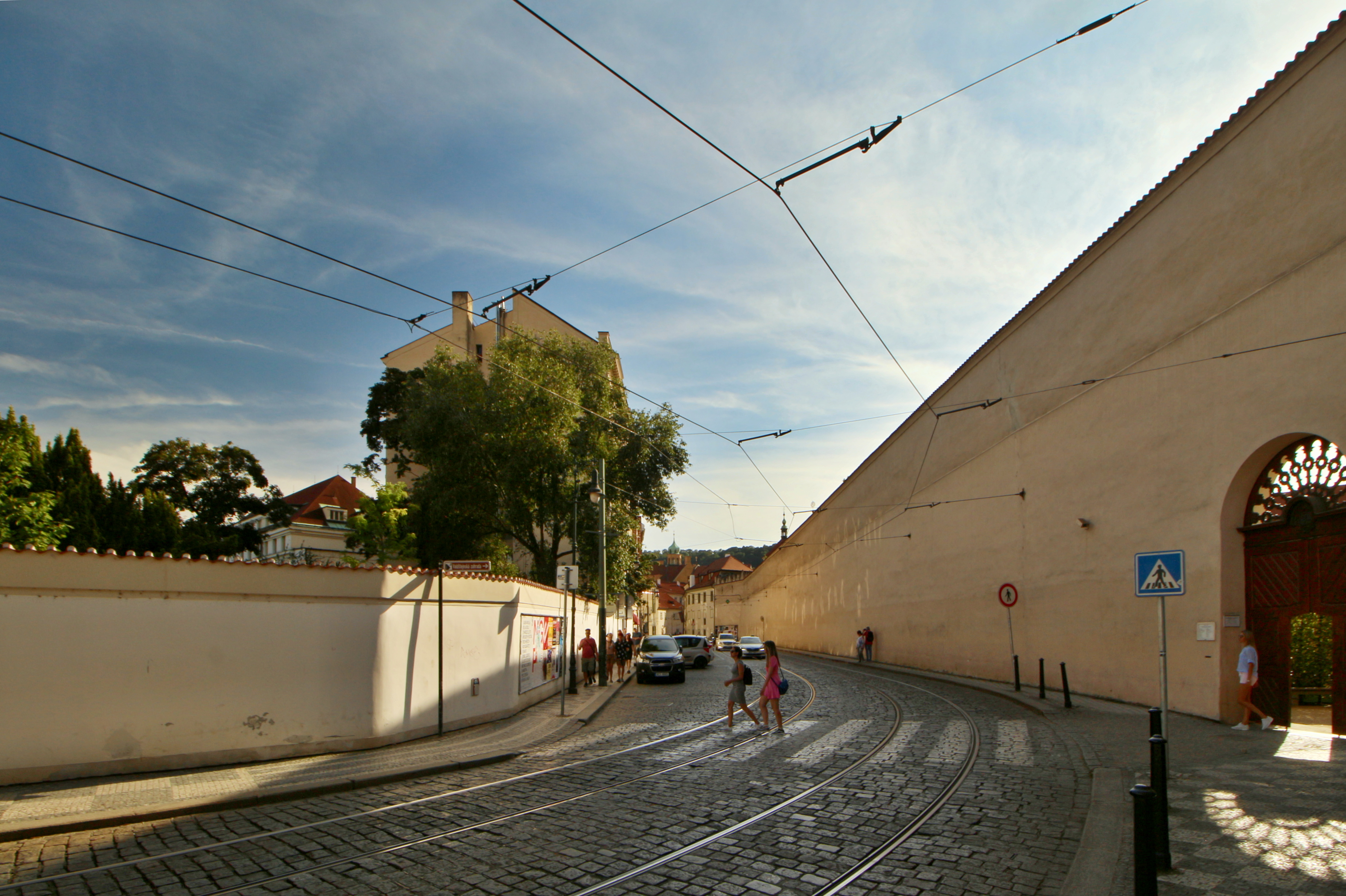 Praha 1-Malá Strana, Letenská ulice